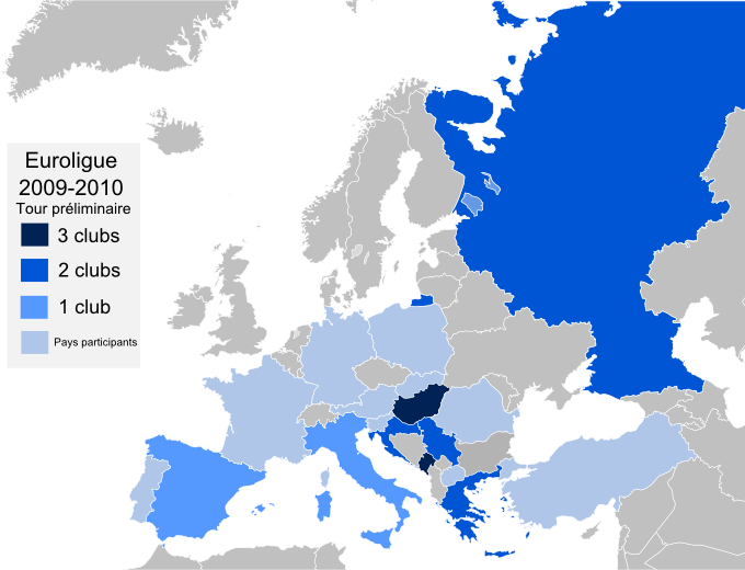 Carte des pays par équipes qualifiées au tour préliminaire de l'Euroligue de water-polo 2009-2010.